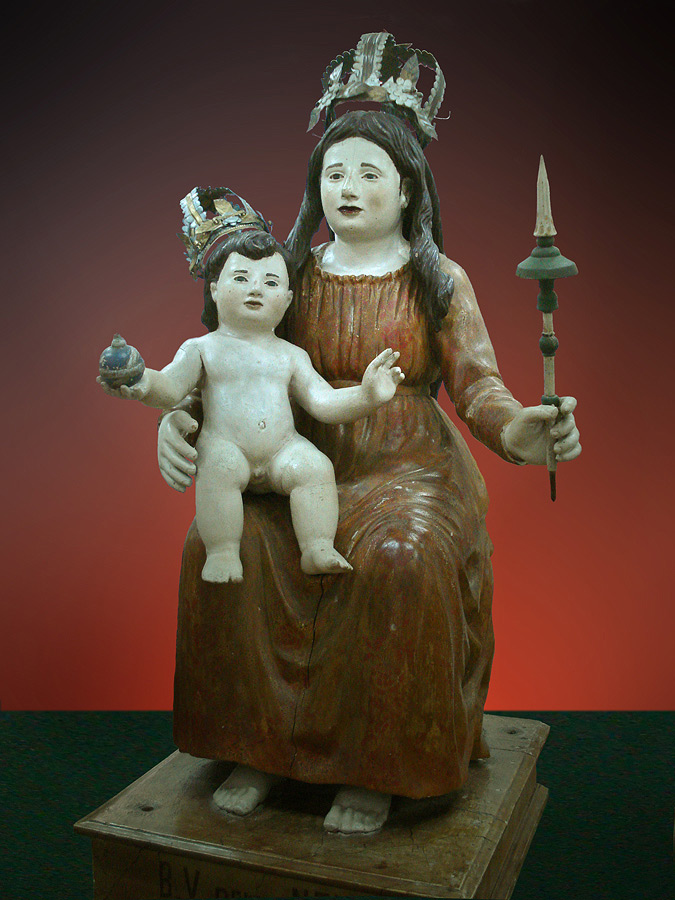 Nossa Senhora da Neve, 1885, obra de Pietro Stangherlin no Museu Municipal de Caxias do Sul, Brasil. Fundo editado